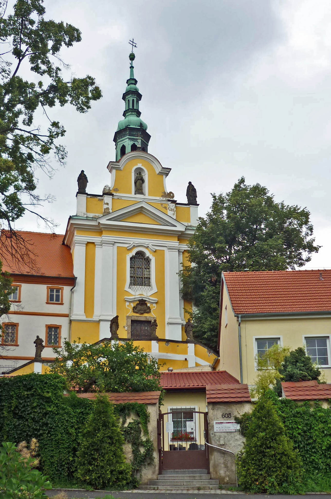 Kadaň, okres Chomutov. Klášter alžbětinek a kostel svaté Rodiny a svaté Alžběty.